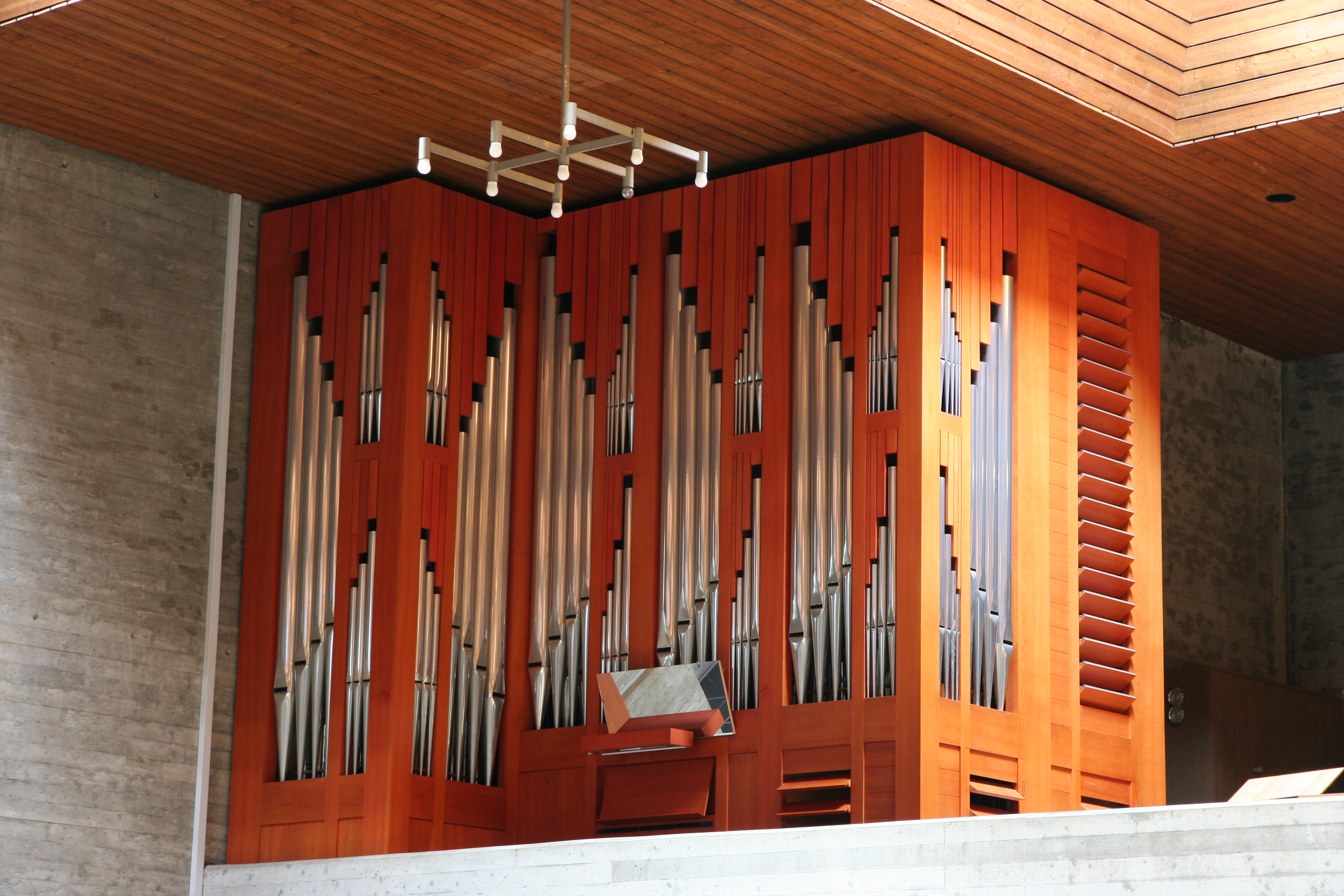 Römisch-katholische Pfarrkirche Christ König Biel/Bienne